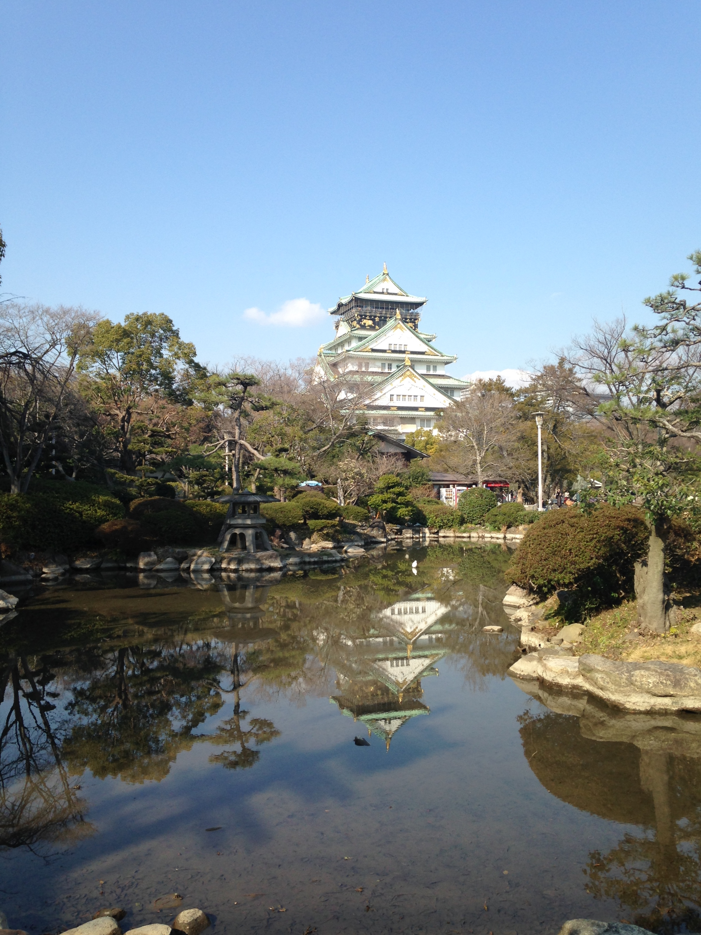 大坂城天守閣と元紀州御殿の庭